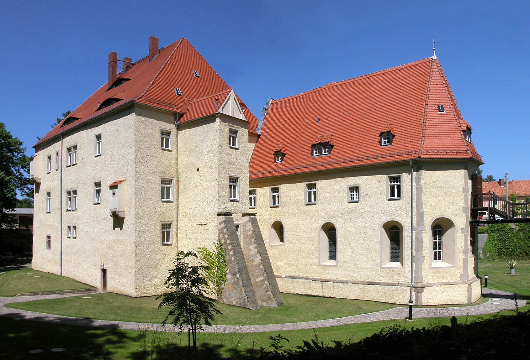 30.05.2003 01623 Schleinitz (Nossen): Aus mittelalterlicher Wasserburg hervorgegangenes Schloß. [DSCN]20030530090MDR.JPG(c)Blobelt